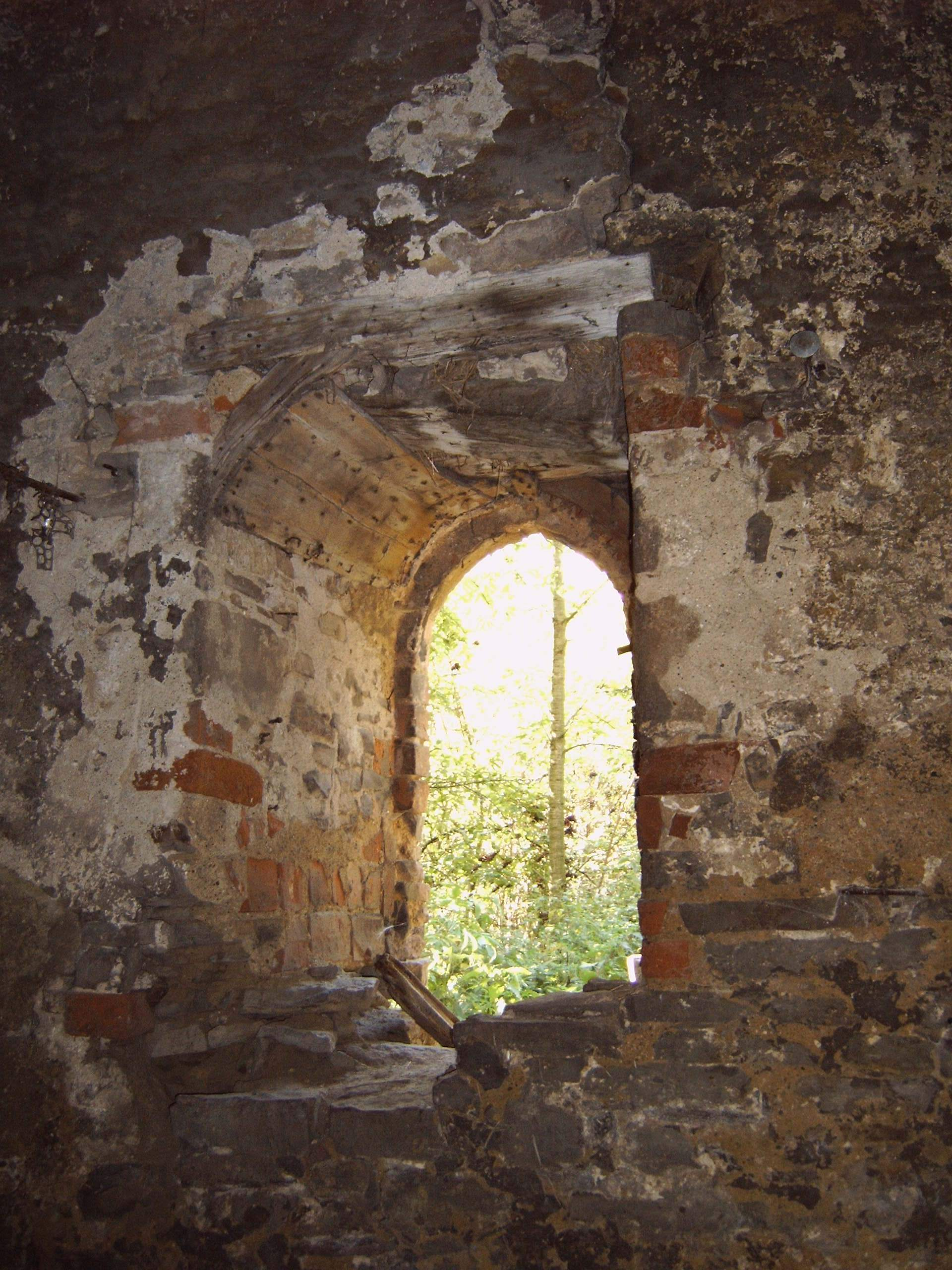 Wohnturm Benneckenbeck, Fenster im Erdgeschoss, Westseite, Bild aufgenommen am 20. September 2005 von Benutzer:Olaf2